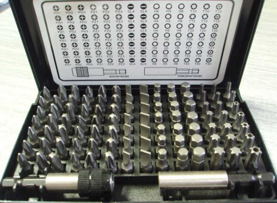 Tona bits